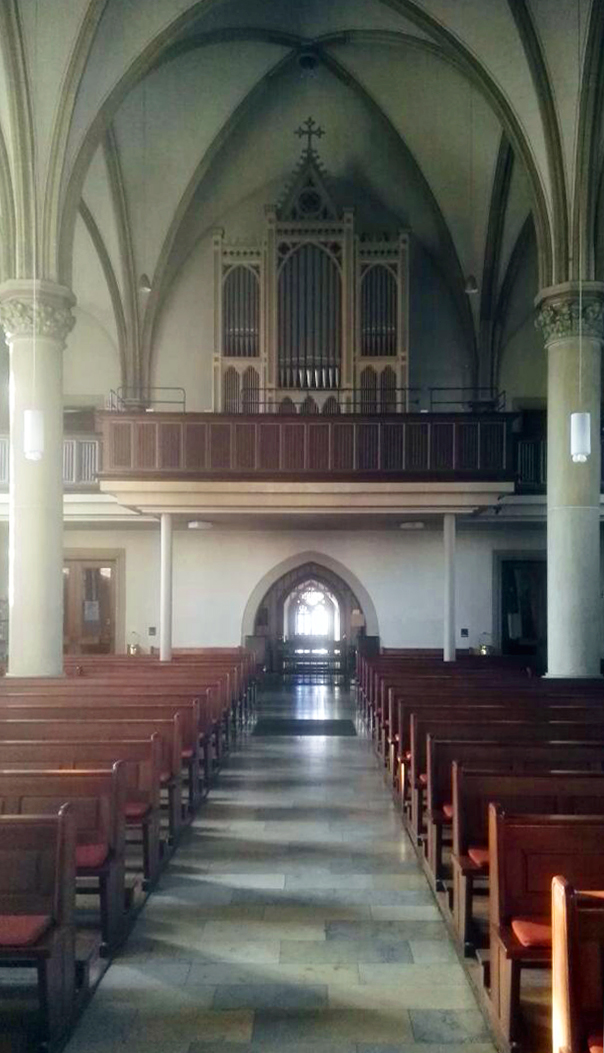 Die Orgel in St. Mariä Himmelfahrt, Appelhülsen